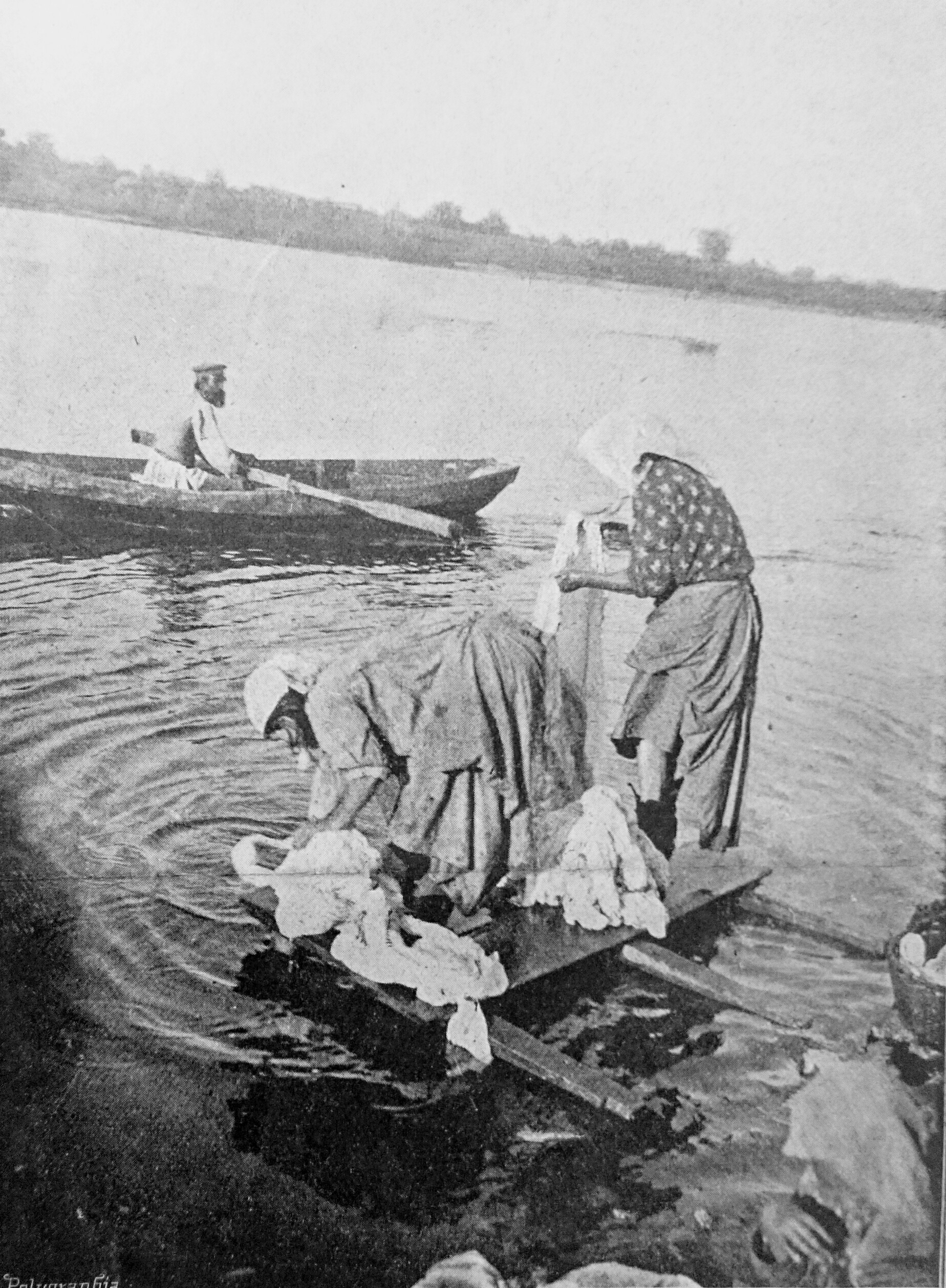 Pradleny z okolí Moskvy (1913)